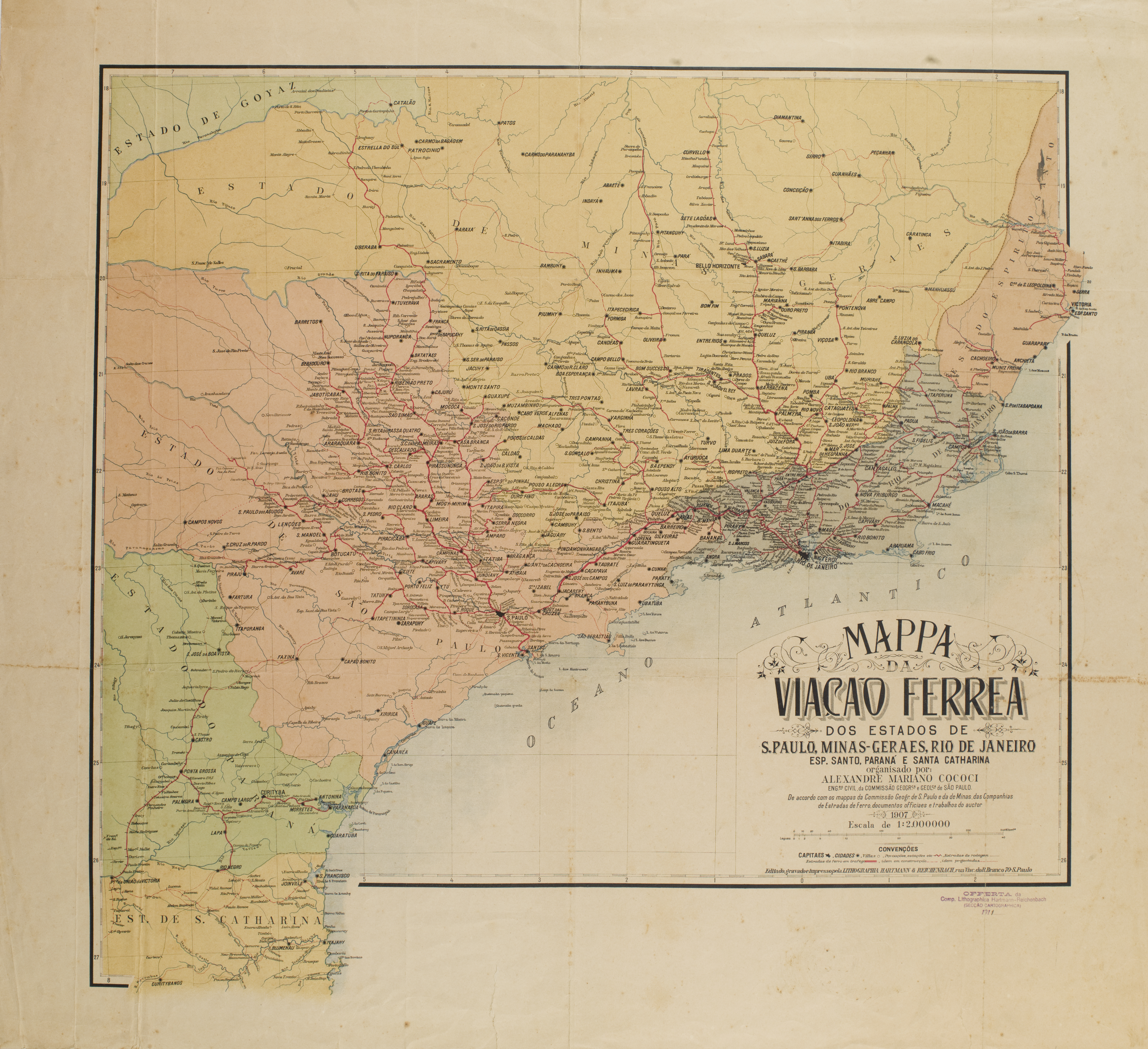 Obra que integra o acervo do Museu Paulista da USP. Coleção João Baptista de Campos Aguirra - Ref. Agente: Comissão Geográfica e Geológica do Estado de São Paulo. Lithographia Hartmann & Reichenbach (São Paulo)